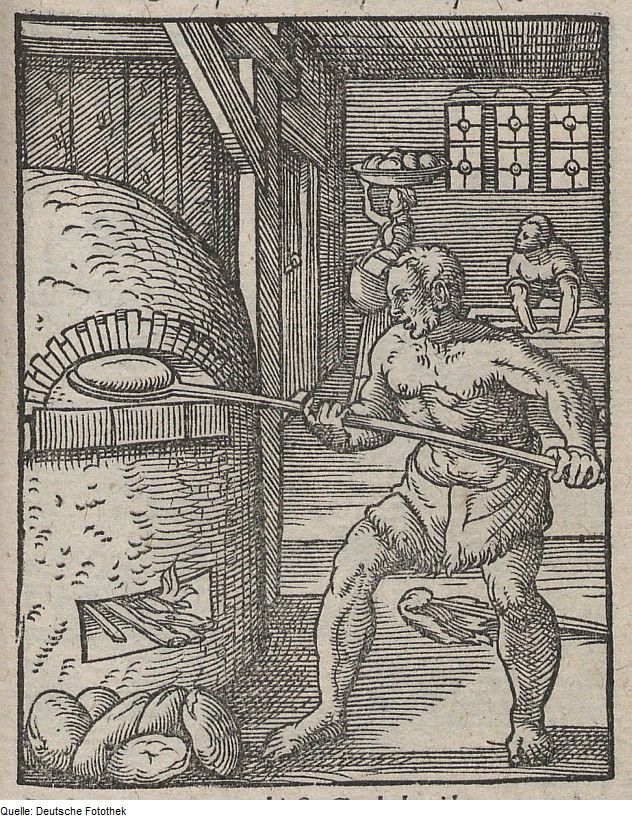 Original image description from the Deutsche Fotothek Ständebuch & Handwerk & Bäcker